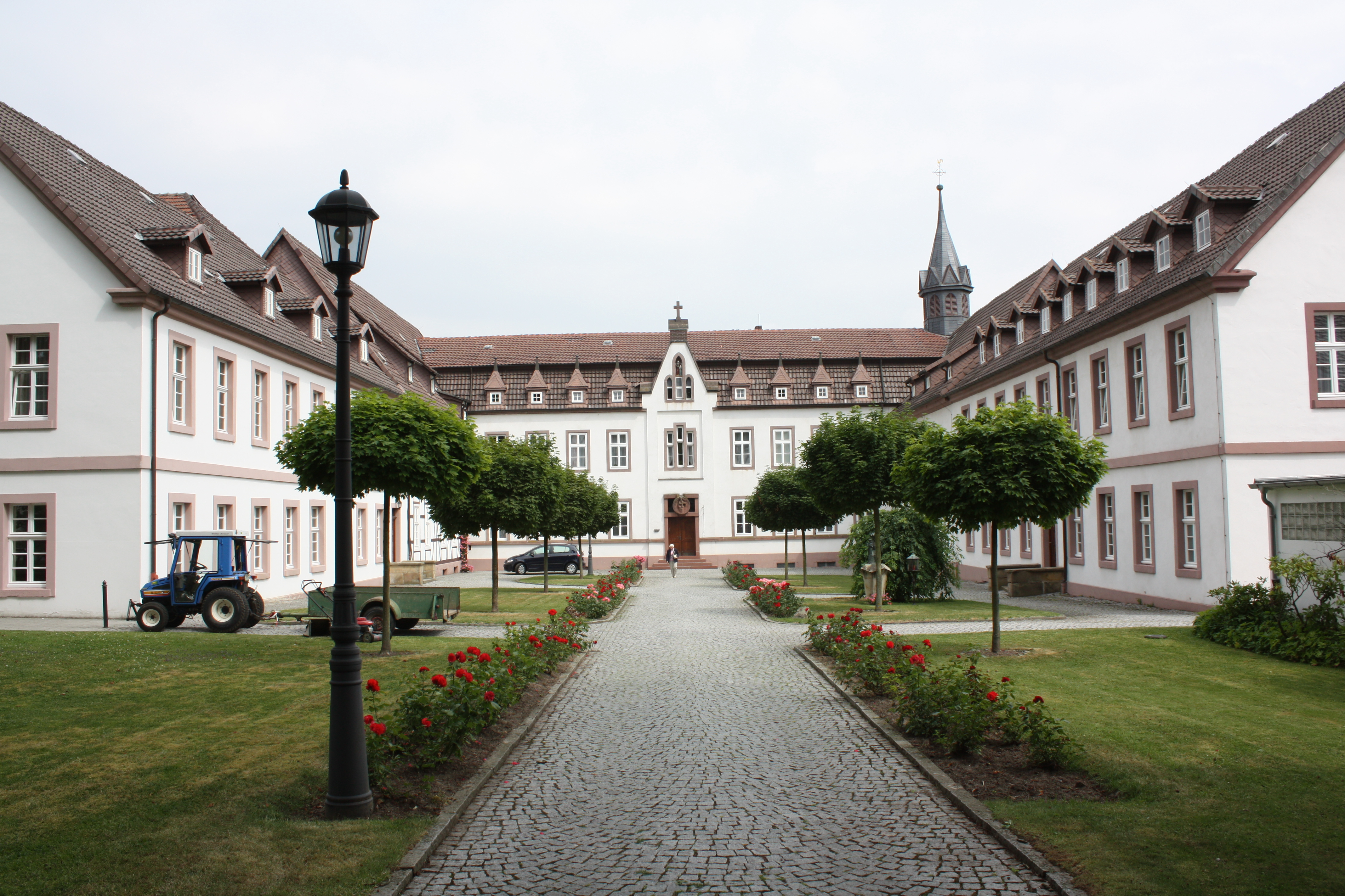 Kloster Maria Opferungstal in Brakel